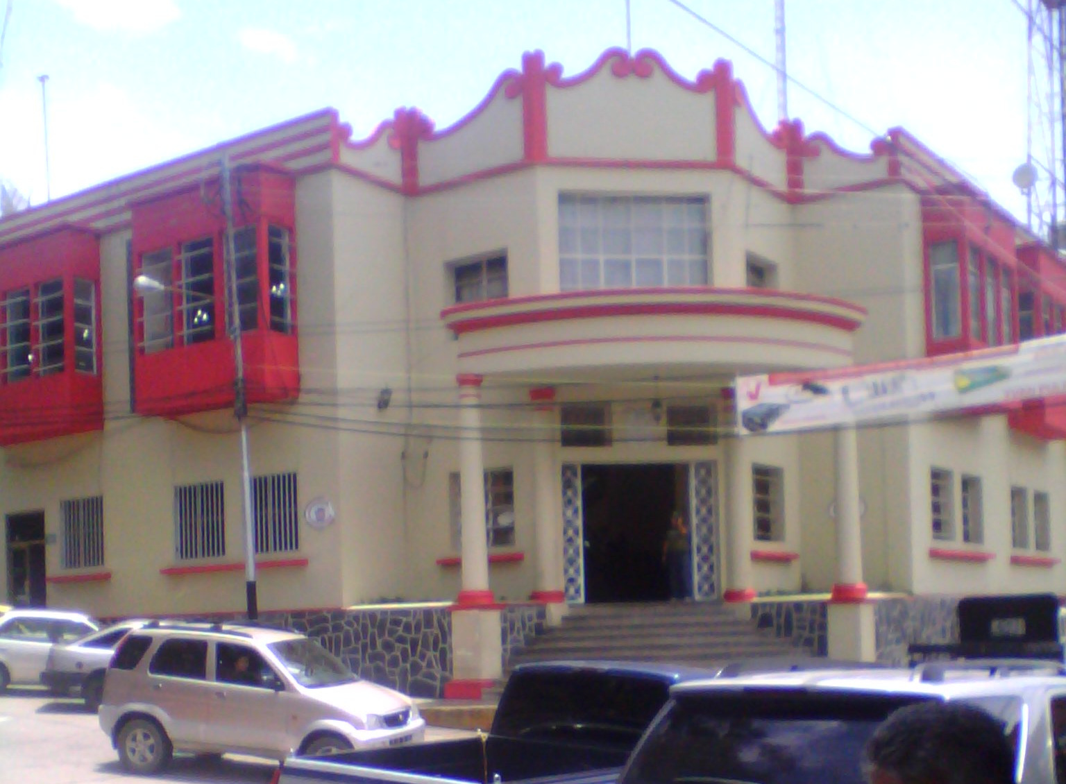 TOVAR